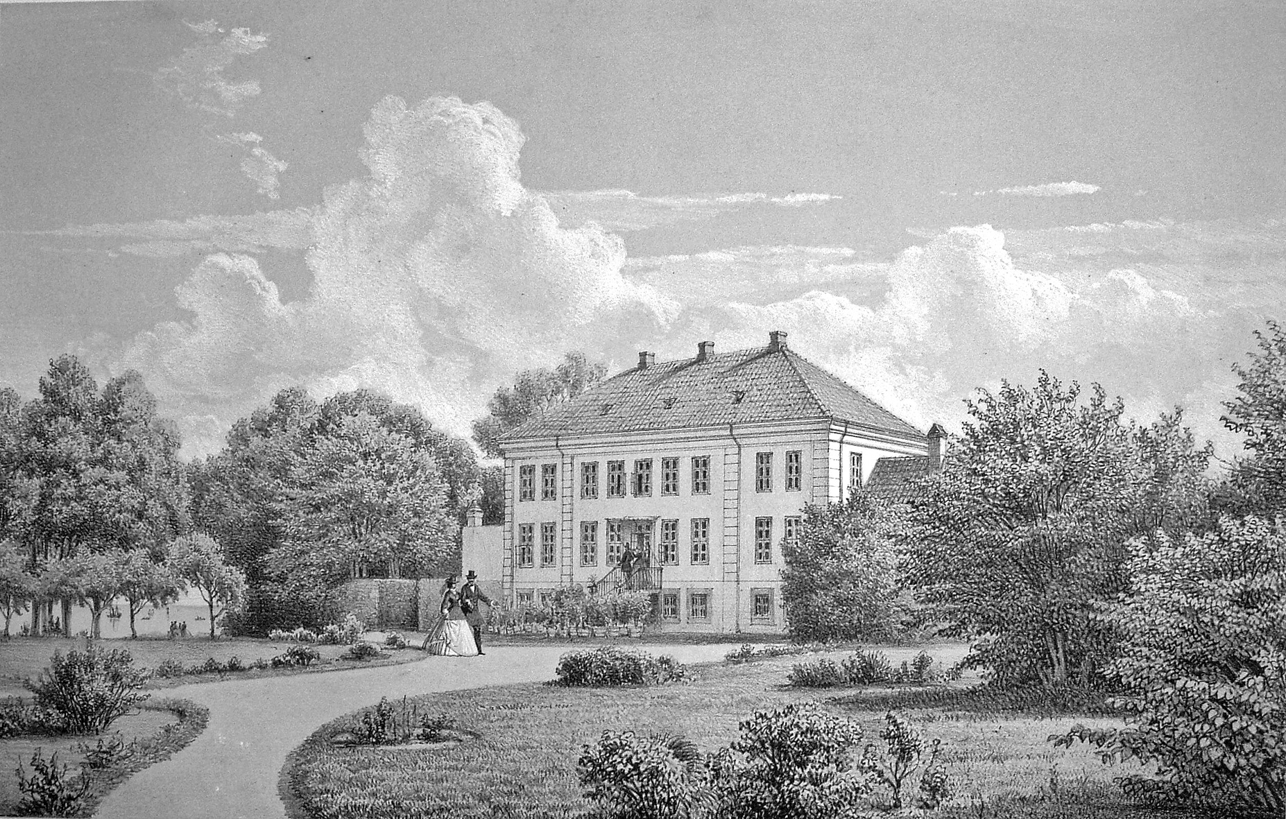 Krogerup nævnes første gang i 1577 og er opstået af flere bøndergårde, der er blevet slået sammen til en hovedgård. Krogerup ligger i Humlebæk Sogn i Fredensborg Kommune. Hovedbygningen er opført i 1772-1776 og ombygget i 1837. Statens jordlovsudvalg overtog alle jorder i 1942 og Krogerup blev i 1953 til en højskole.